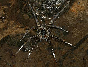 female Dolomedes yawatai from Okinawa.